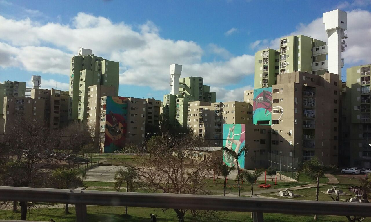 Conjunto urbano Soldati, visto desde la Autopista Cámpora. Buenos Aires, Argentina.